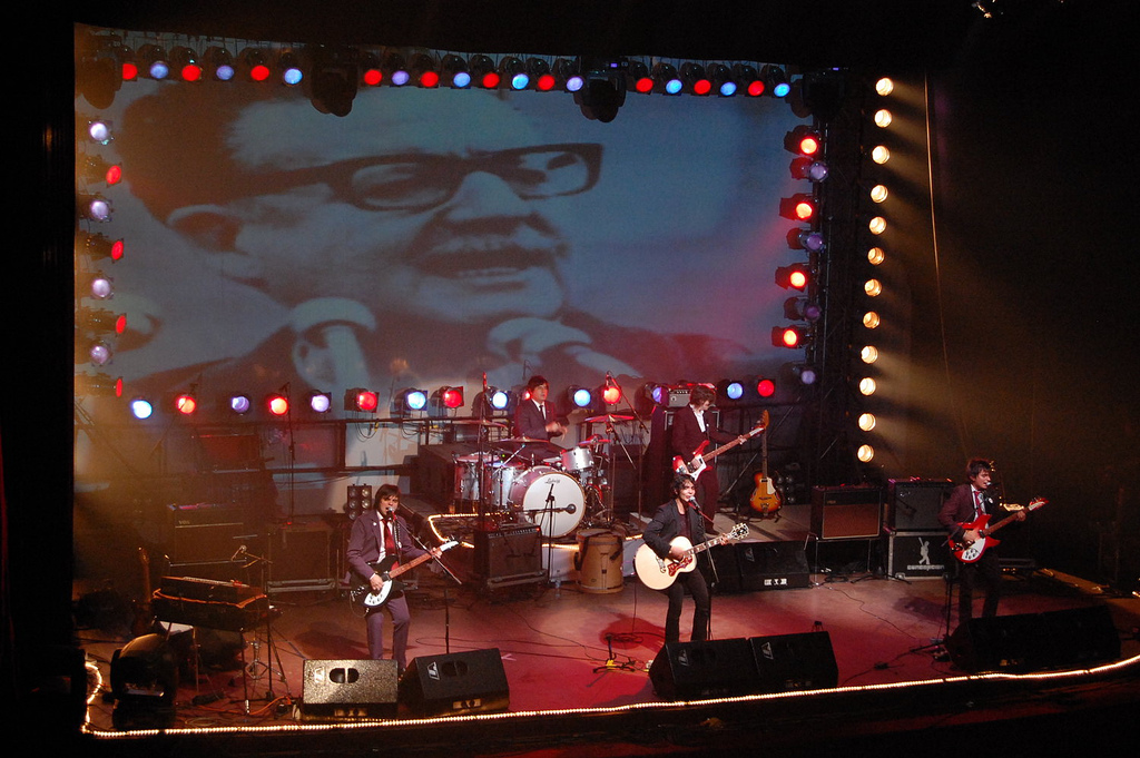 La banda chilena "Los Bunkers" tocando en el Teatro Concepción en la ciudad homónima.